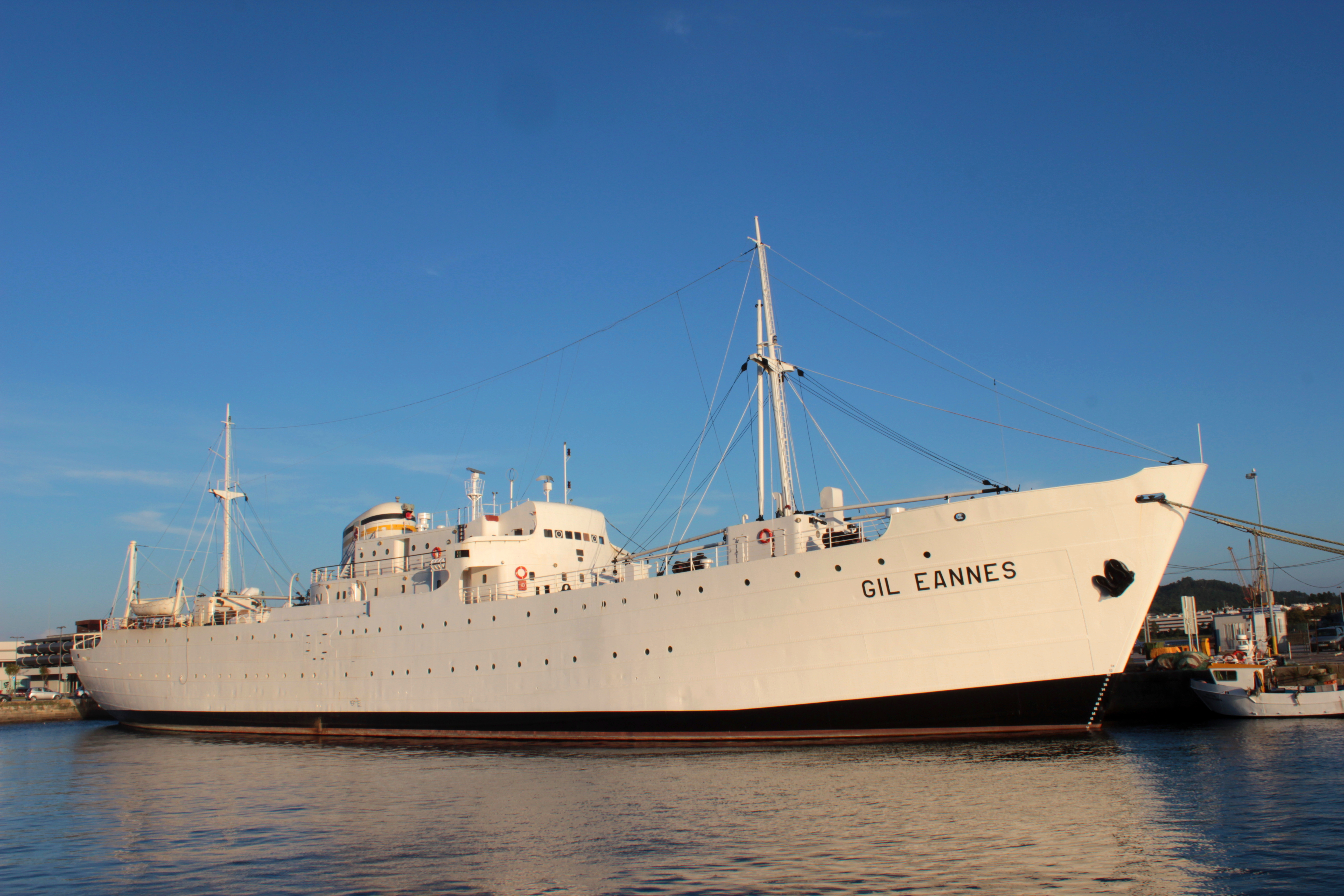 Viana do Castelo